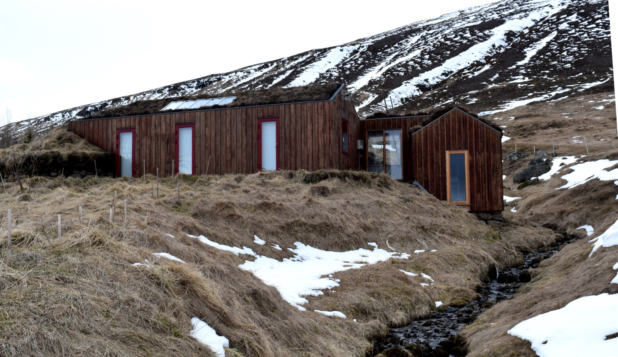 Gullbringulækur í Svarfaðardal